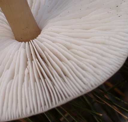 Horngrauer Rübling (Collybia butyracea) nur der Stielansatz und die Lamellen / Ort: Tuchenbach, Landkreis Fürth bei Nürnberg